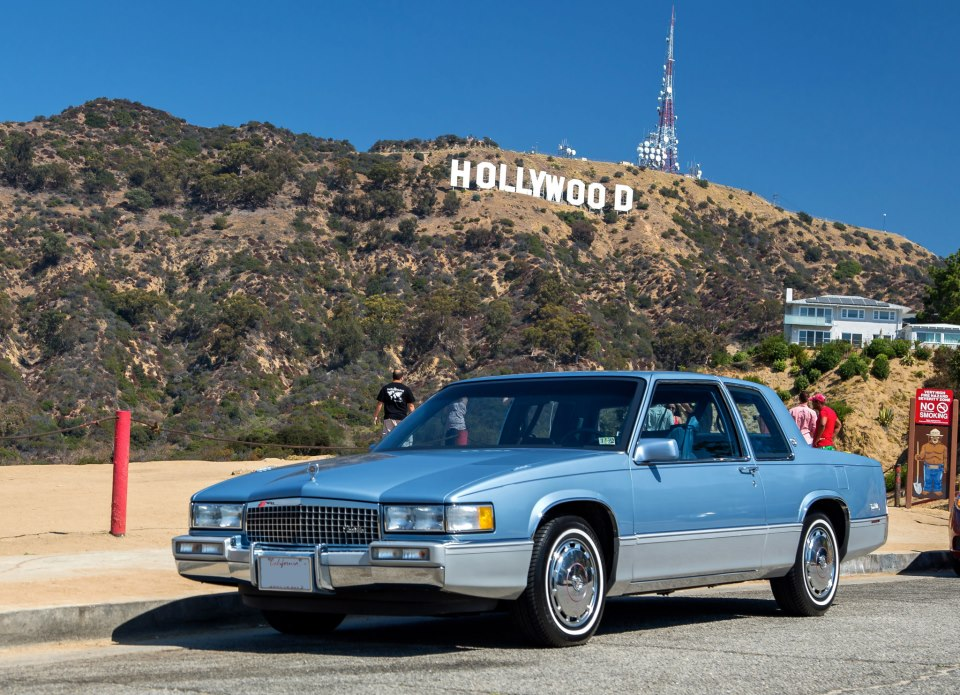 1990 Cadillac Coupe Deville